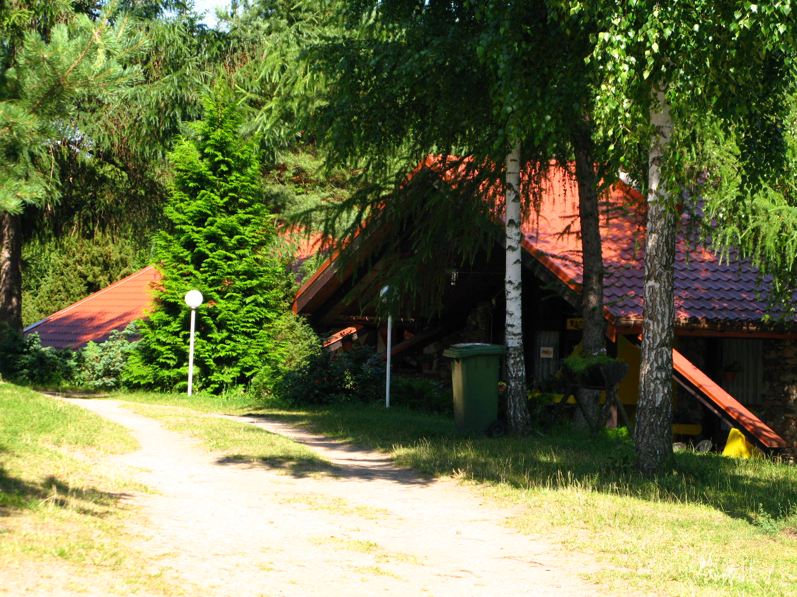 przystań Bieńki